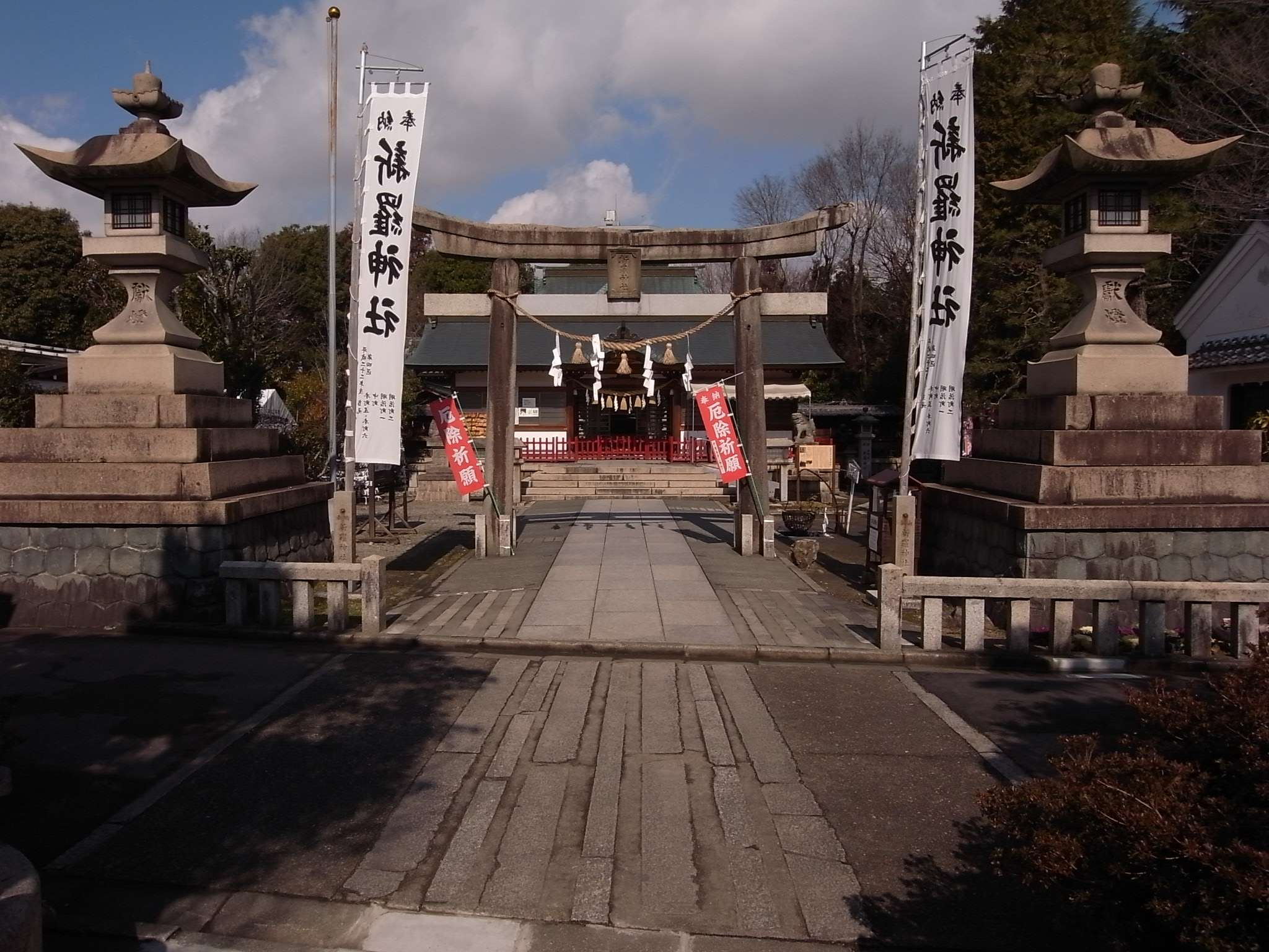 新羅神社 （岐阜県多治見市）